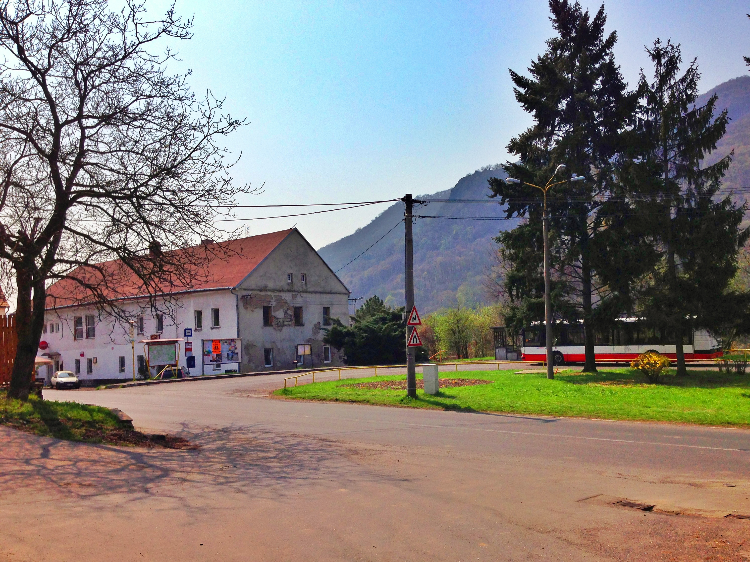 Konečná zastávka autobusové městské hromadné dopravy v Brné nad Labem. V pozadí je turistický rozcestník a restaurace U Kapličky.